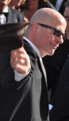 Jacques Audiard au festival de Cannes